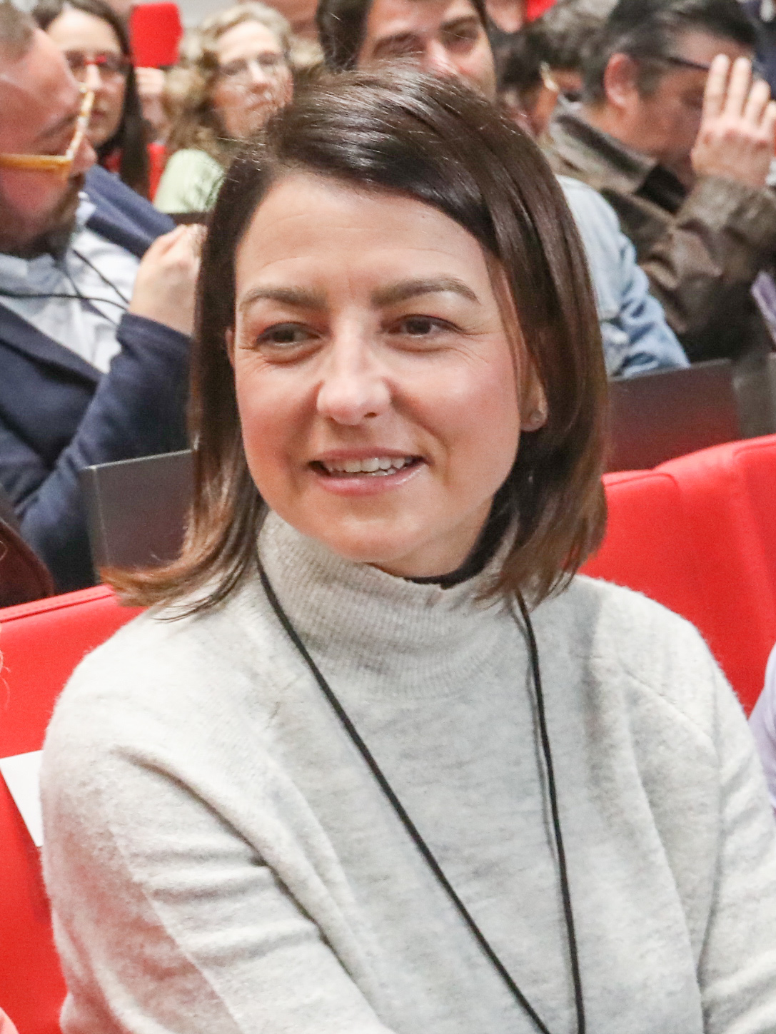 7M0A7095